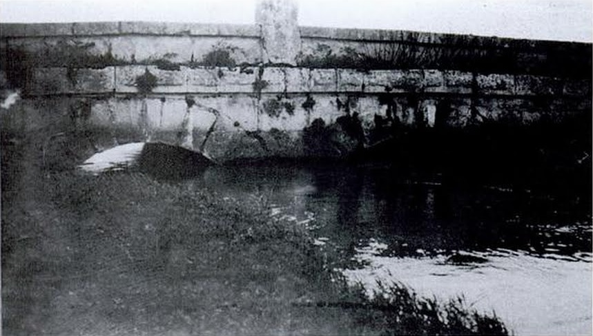 Ponte romano a Tor Tre Ponti